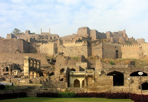 Le fort de Golconda à Hyderabad